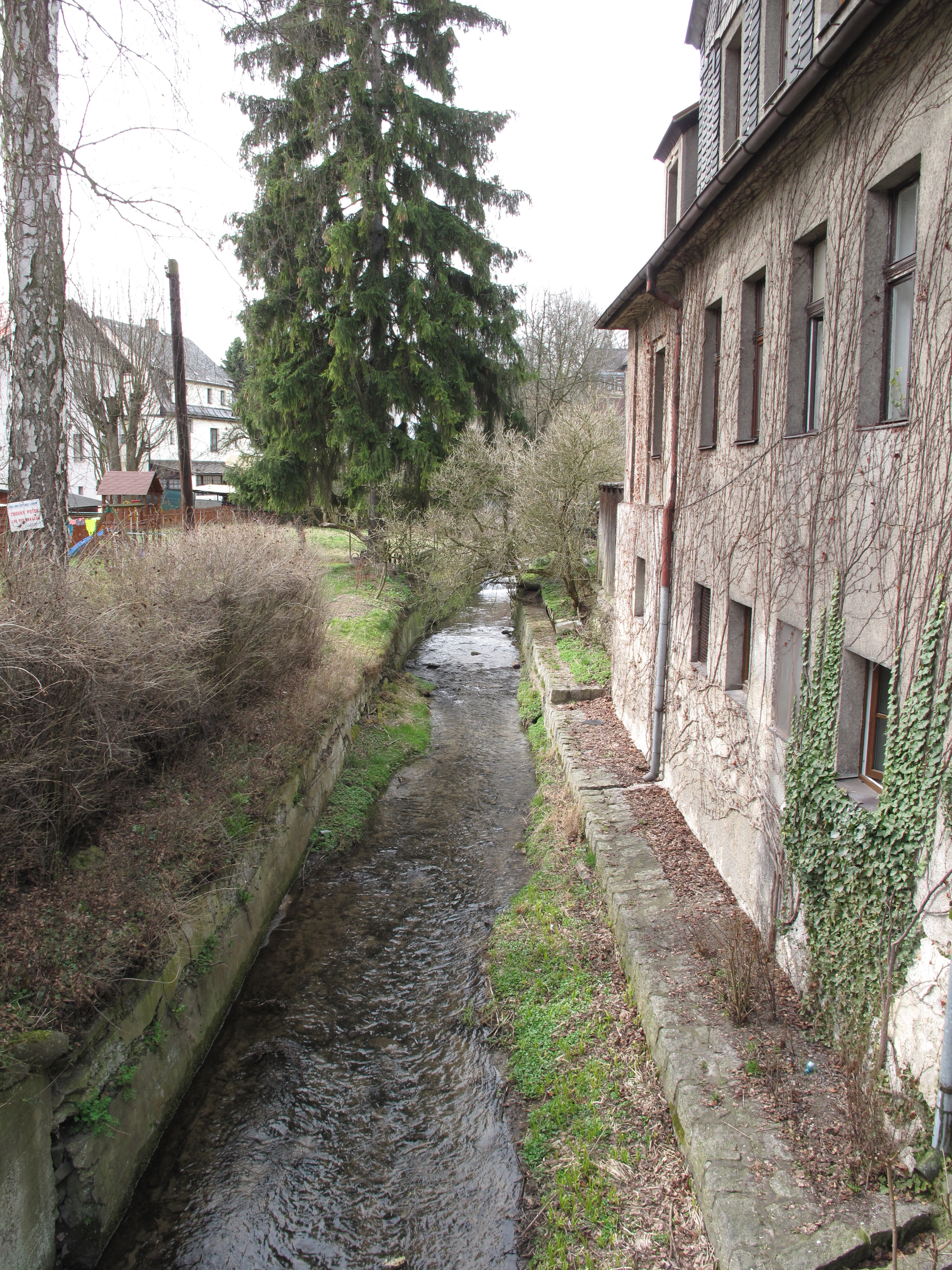 Český Dub IV. Okres Liberec, Česká republika. Ještědka u domu Husova čp. 25.